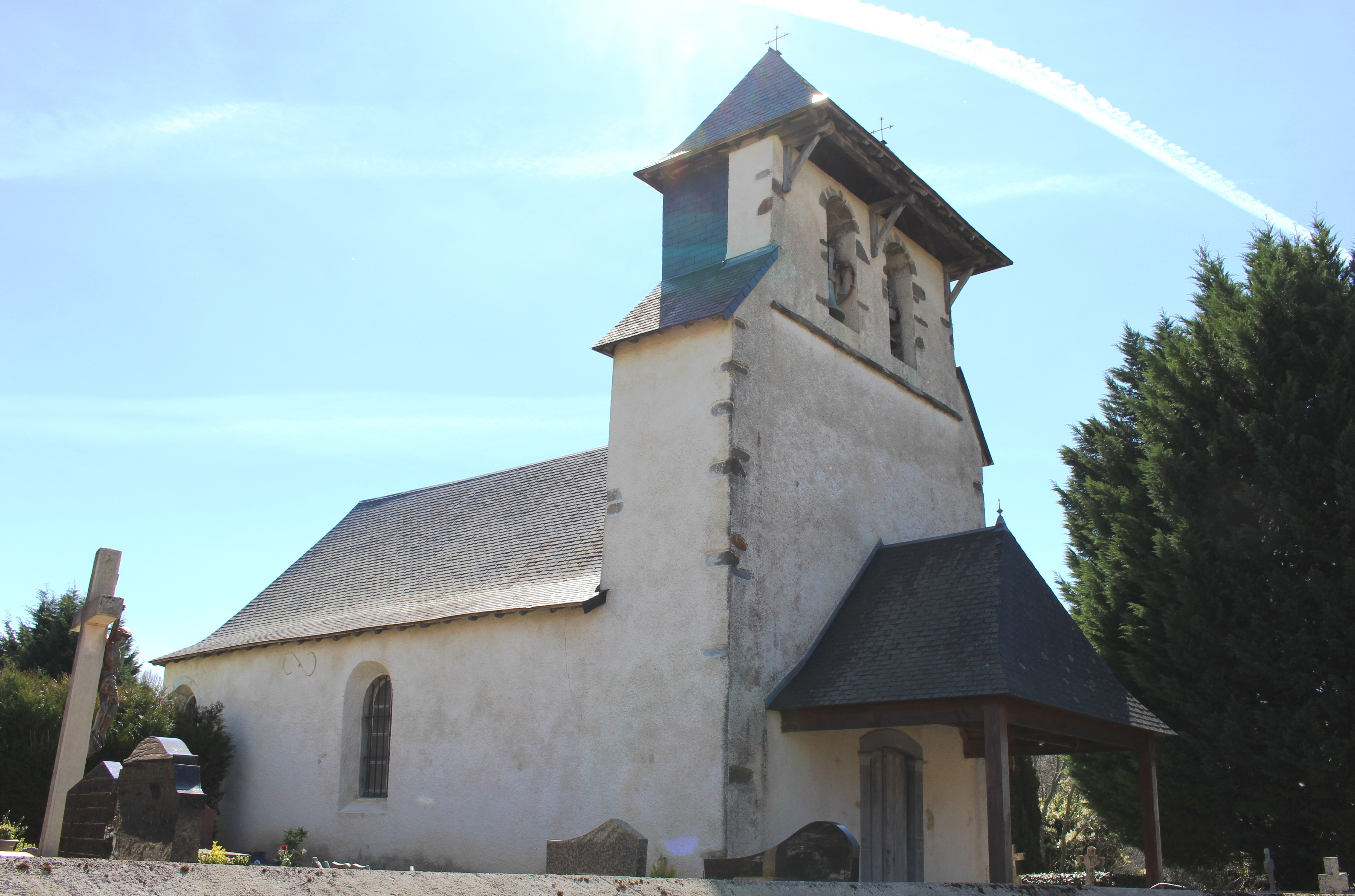 Église Saint-Louis de Gez-ez-Angles (Hautes-Pyrénées)